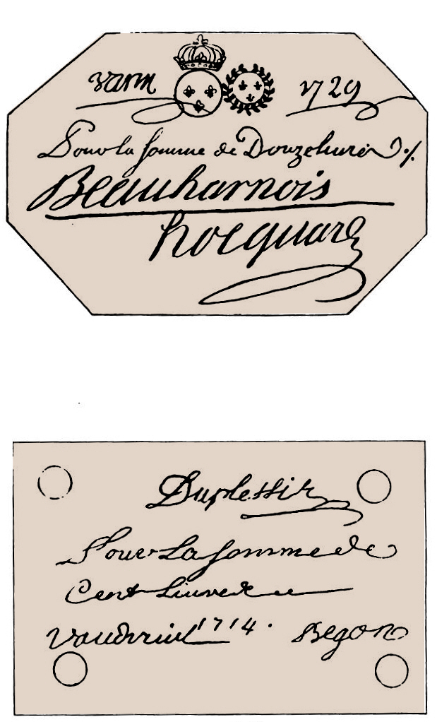 Monnaie de carte de 1714 et 1729. Pour cette dernière, plutôt qu'une carte à jouer, on utilisa une simple carte blanche aux coins coupés, portant sceau et signatures.